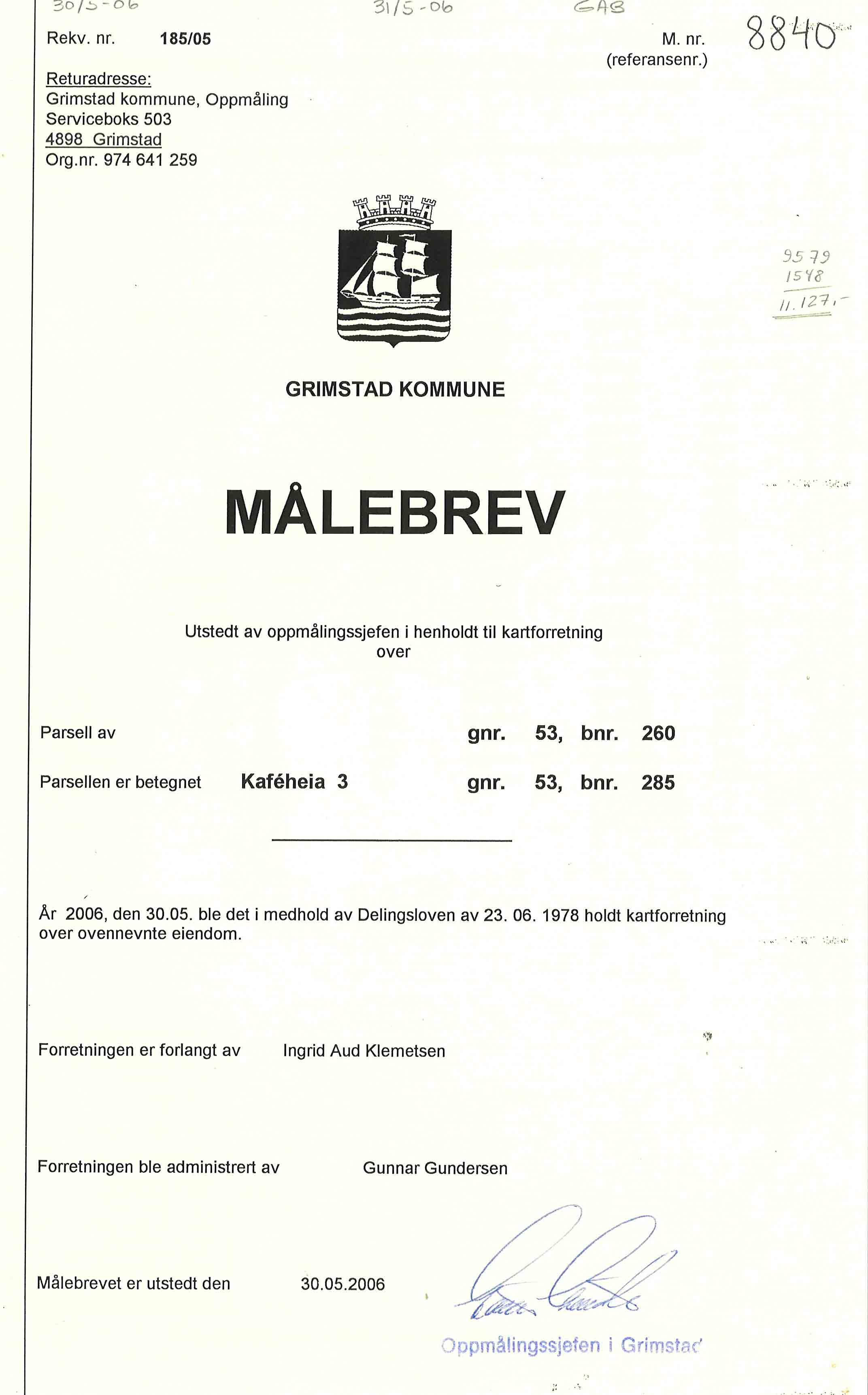 "Delingsforretning", Page 1